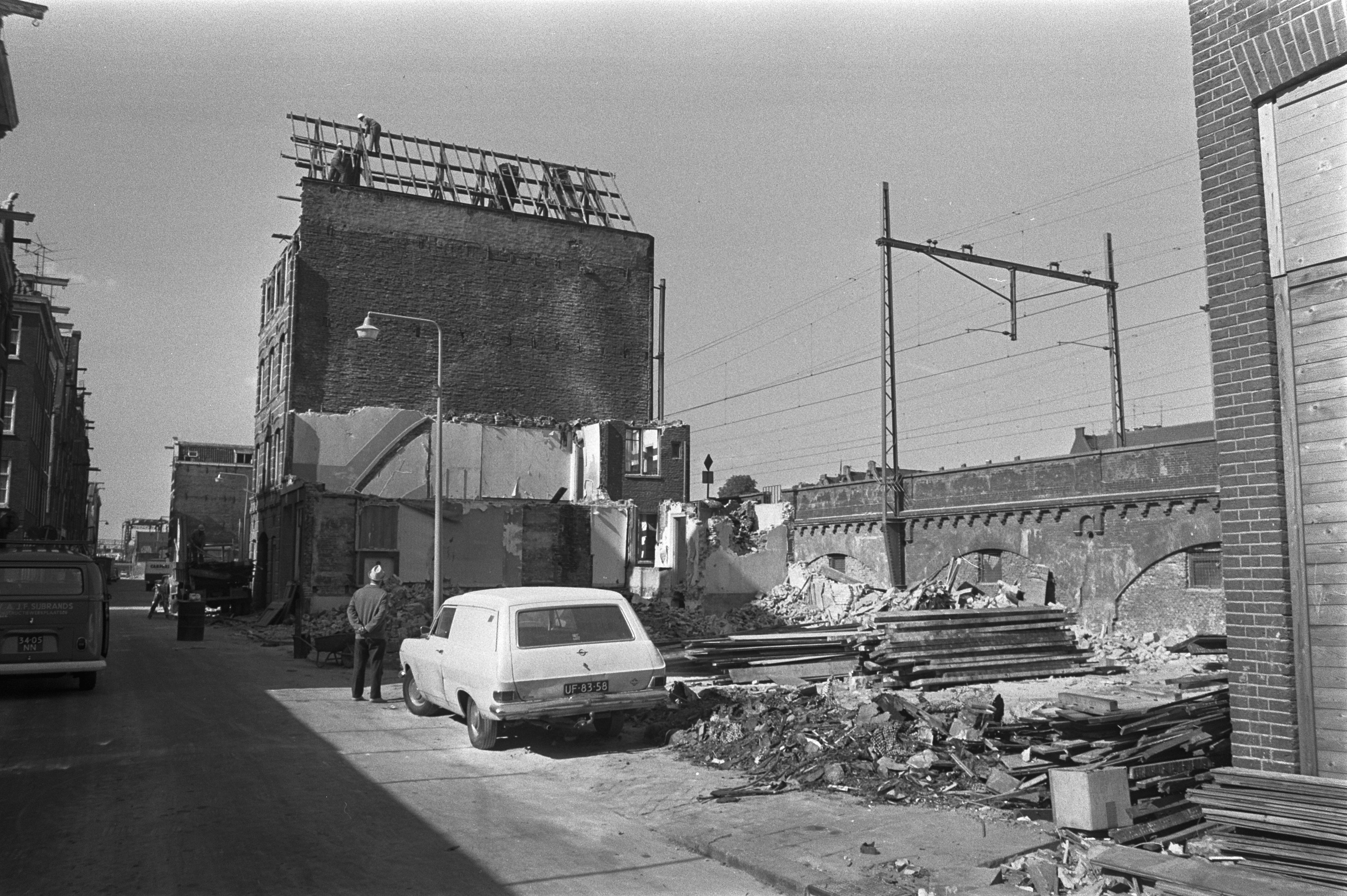 Collectie / Archief : Fotocollectie Anefo Reportage / Serie : [ onbekend ] Beschrijving : Aanleg snelweg door Haarlemmer houttuinen, Amsterdam, overzicht afbraak bij spoorlijn Datum : 16 september 1971 Locatie : Amsterdam, Noord-Holland Trefwoorden : wegenbouw, woonwijken Fotograaf : Croes, Rob C. / Anefo Auteursrechthebbende : Nationaal Archief Materiaalsoort : Negatief (zwart/wit) Nummer archiefinventaris : bekijk toegang 2.24.01.05 Bestanddeelnummer : 924-9416